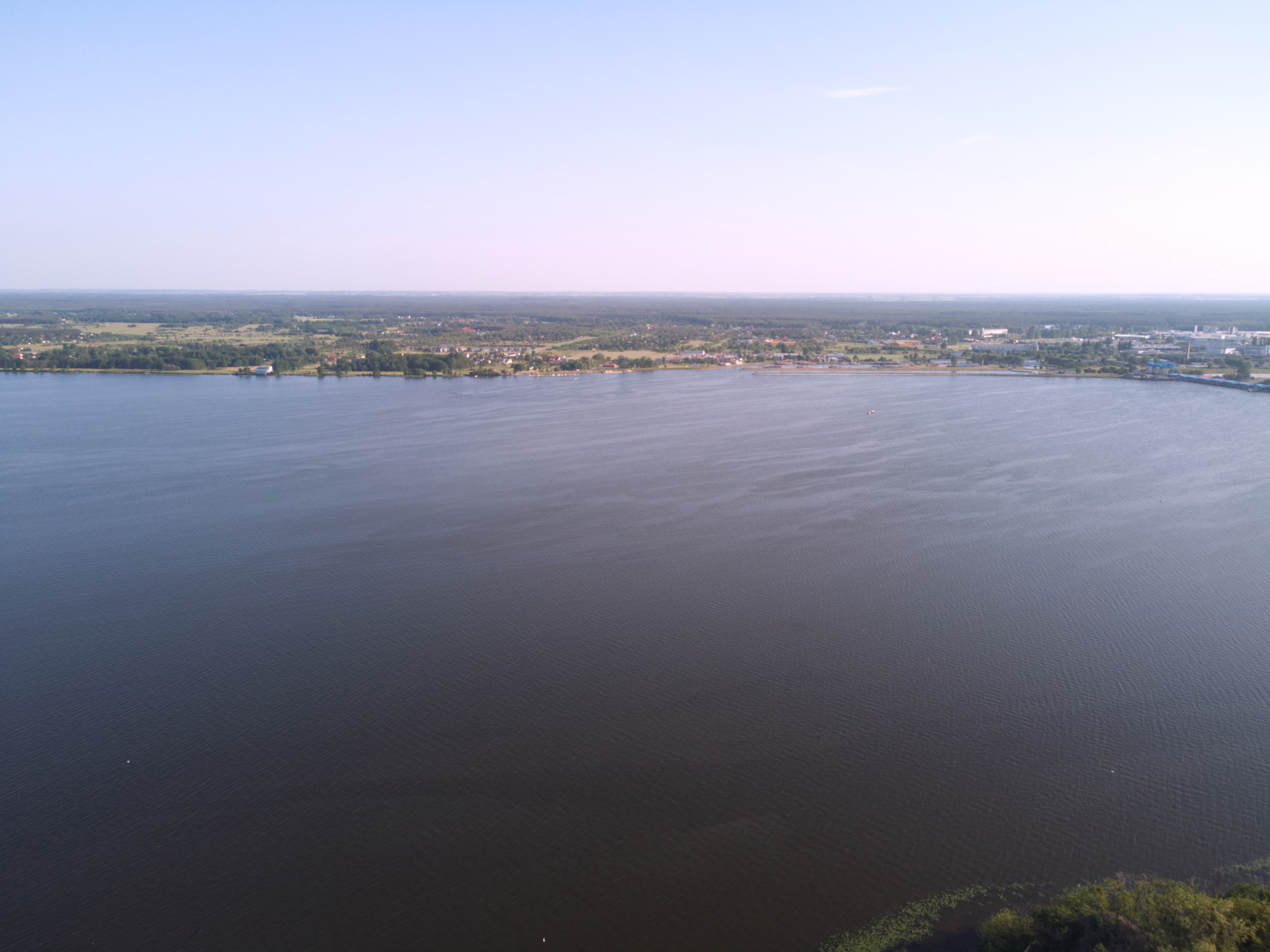 Zalew Włocławski (2020 r.)